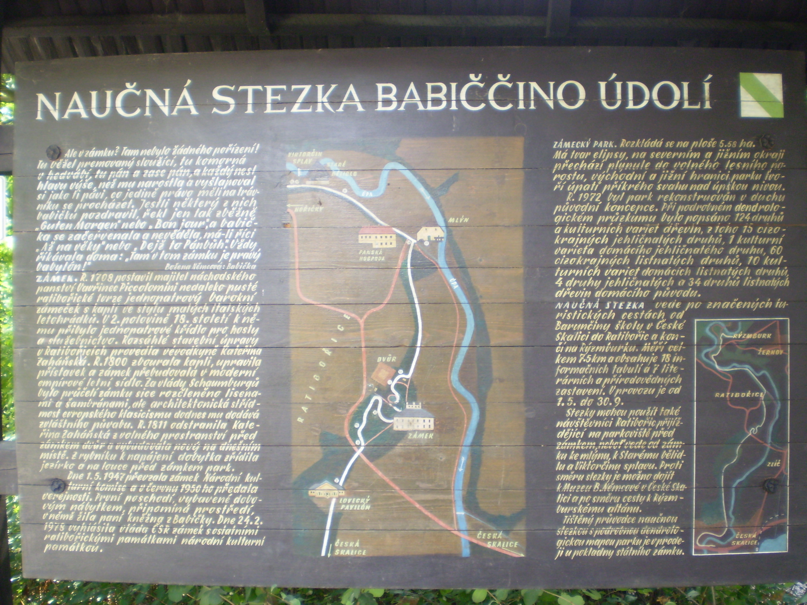 Informační tabule NS Babiččino údolí při vstupu do zámeckého areálu v Ratibořicích